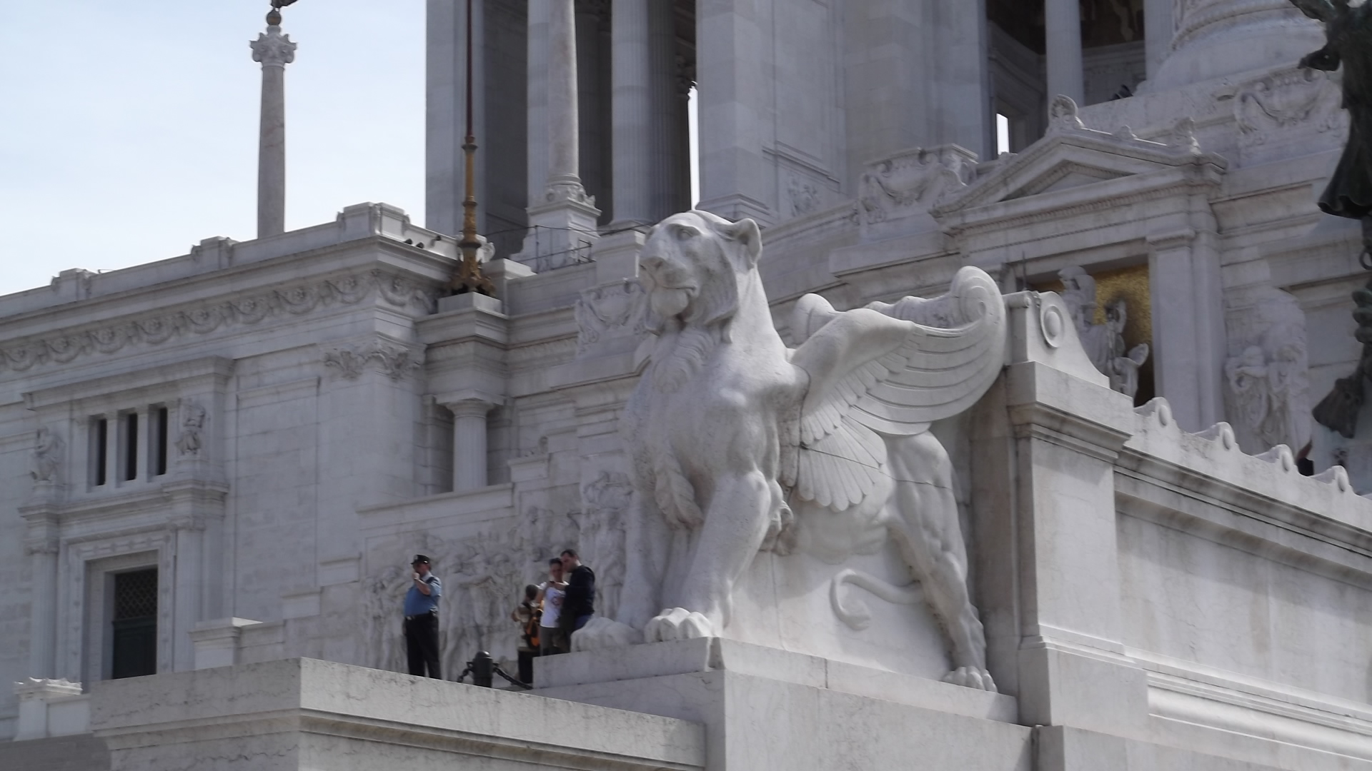 Rione IX Pigna, 00186 Roma, Italy